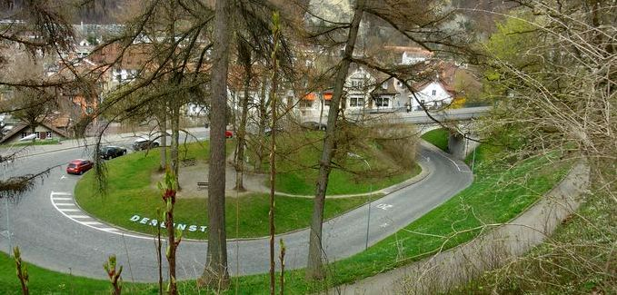 Staldenstraße und Staldenbrücke in Burgdorf/Bern